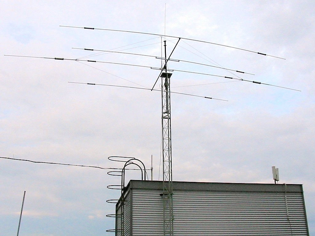 Amateurfunk-Antennenanlage an der TU Braunschweig